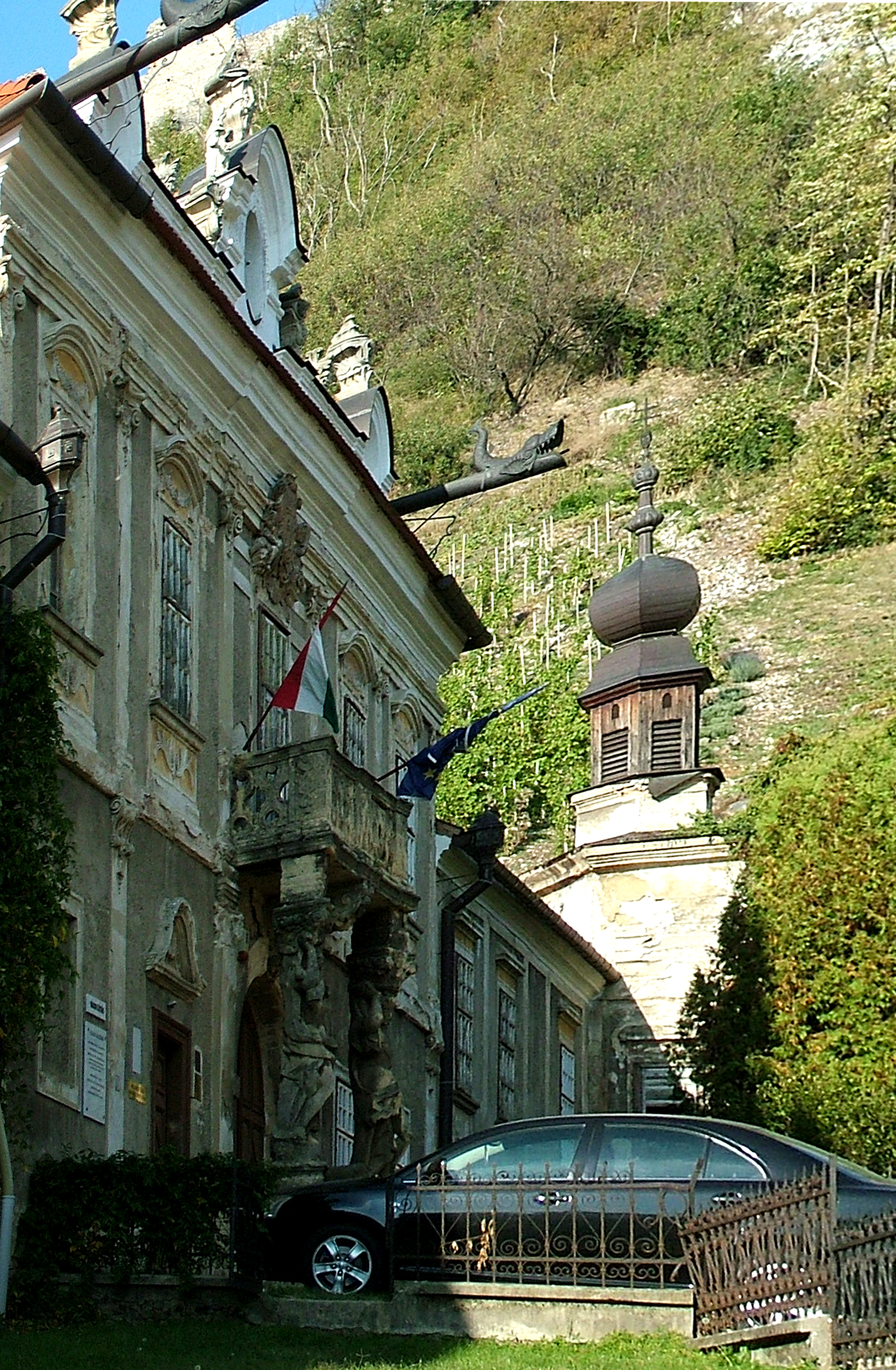 Sümegi püspöki palota